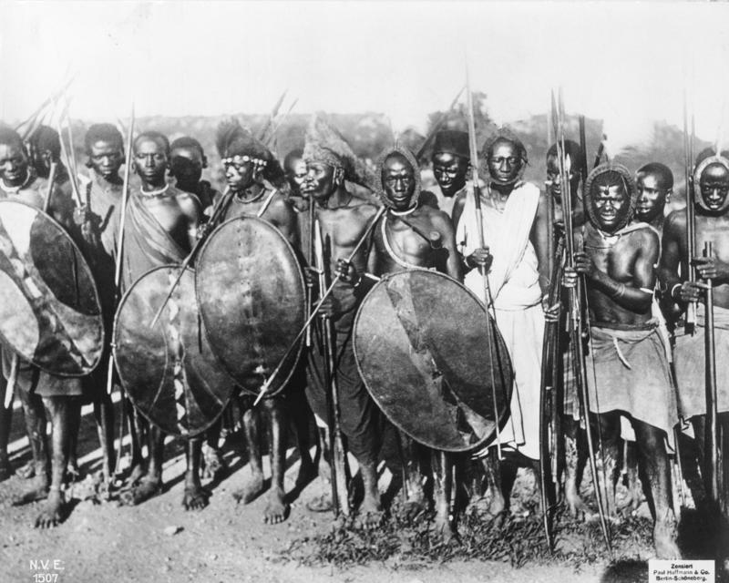 Zu den Kämpfen in Deutsch-Ostafrika Afrikanische Hilfstruppen N.V.E.1507